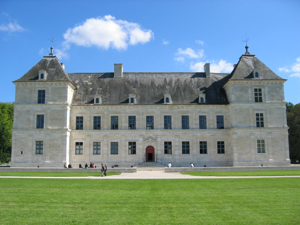 Château d'Ancy-le-Franc - France